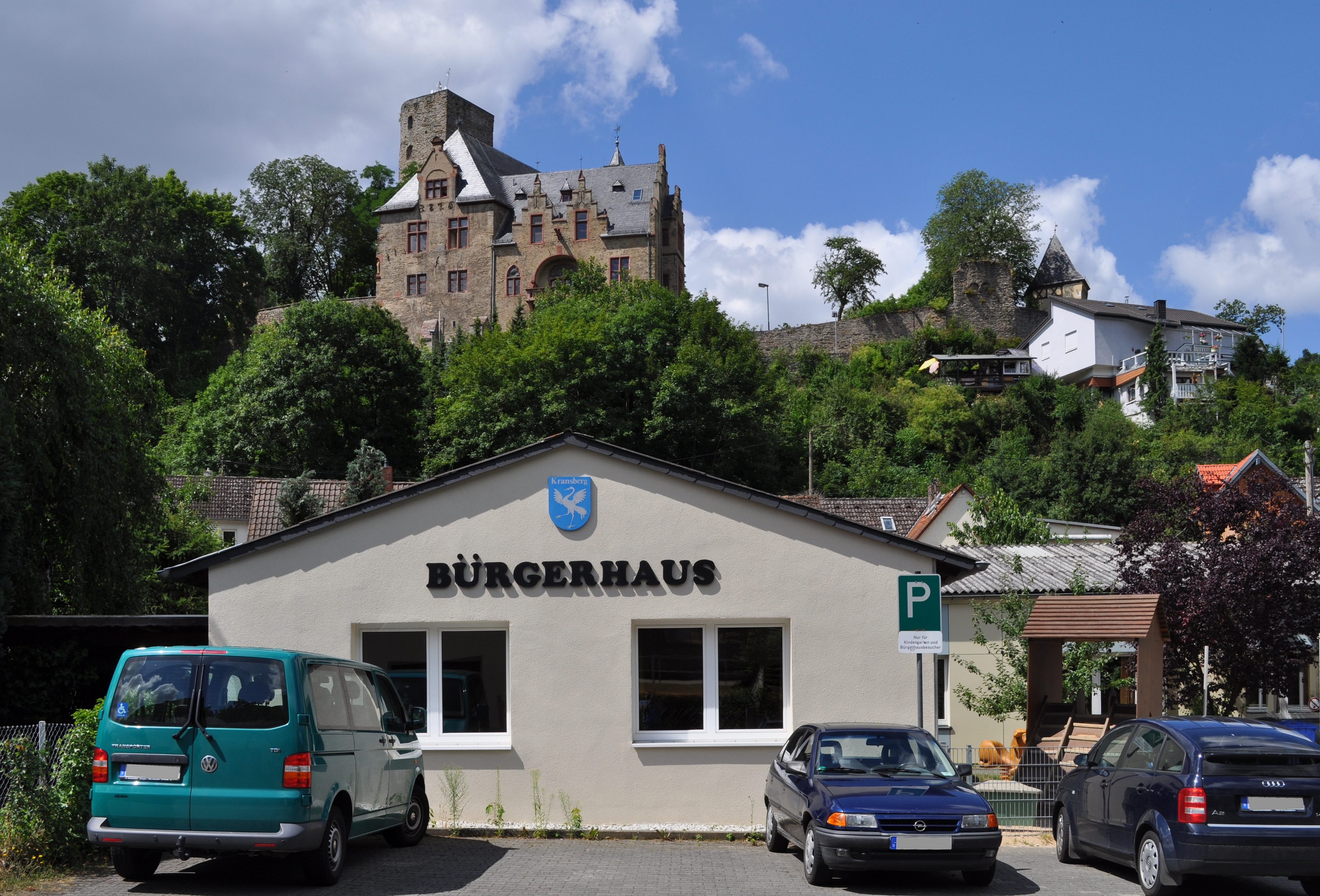 Bürgerhaus in Kransberg. Im Hintergrund die Burg.